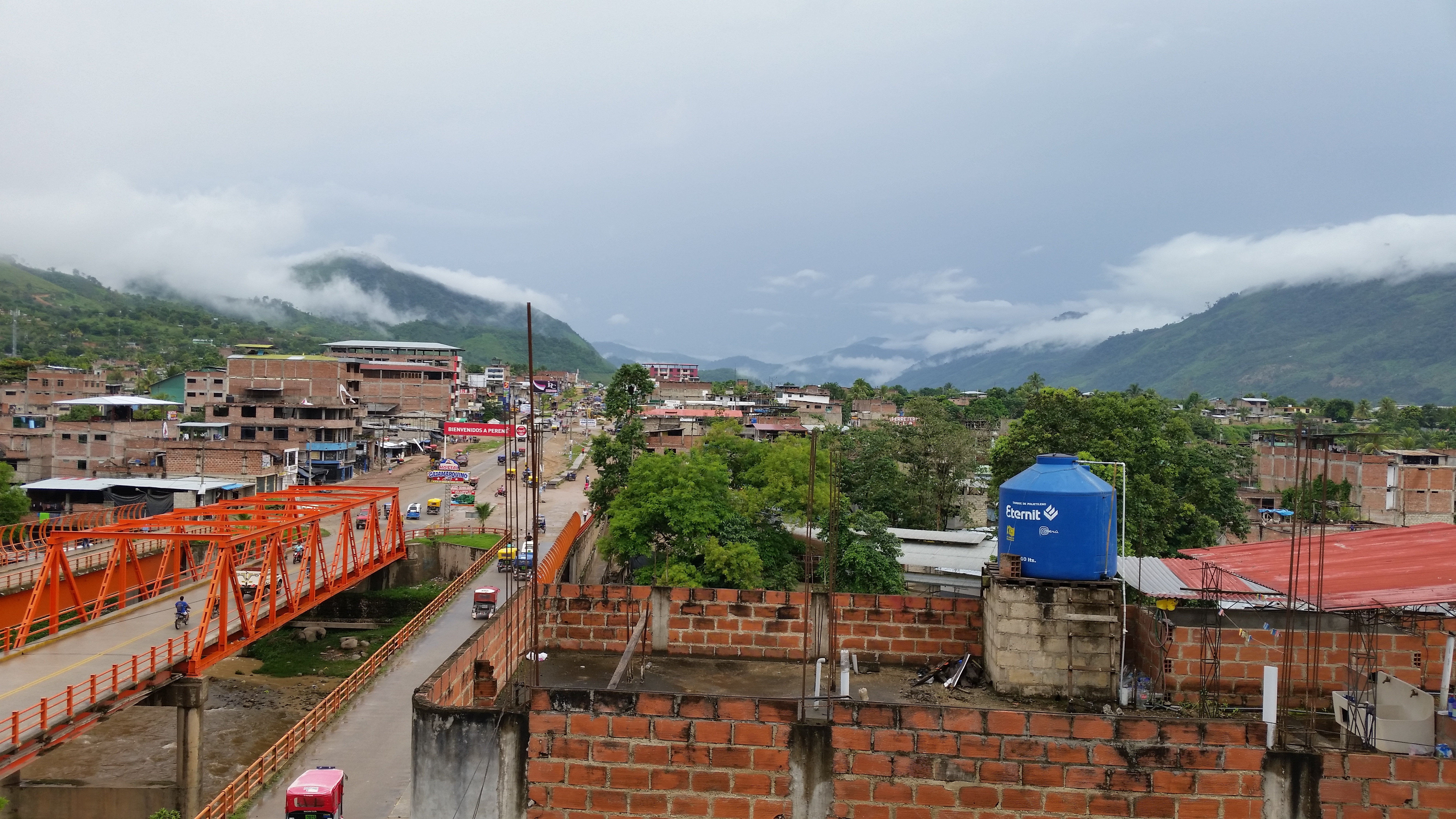 Pichanaqui